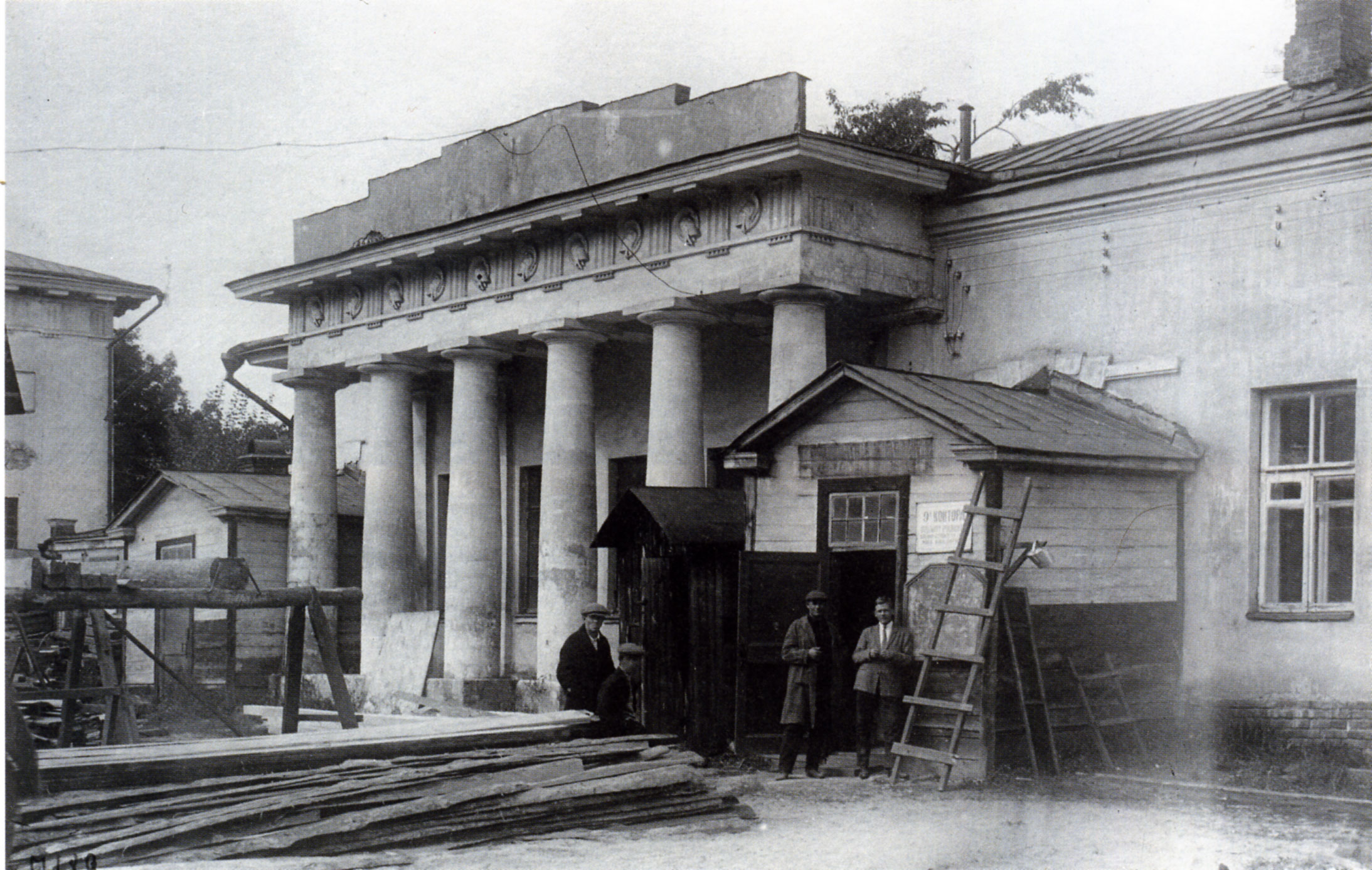 Зубовский бульвар. Кордегардия во дворе Провиантских магазинов